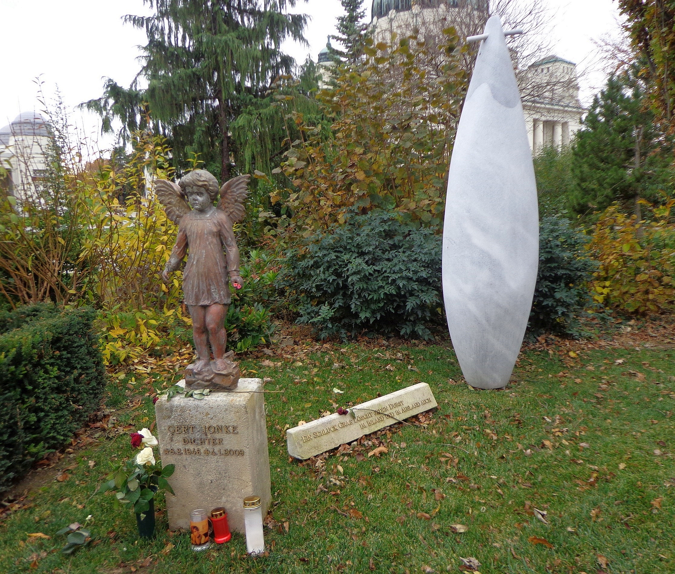 Wiener Zentralfriedhof - Gruppe 33G, Ehrengrab von Gert Jonke